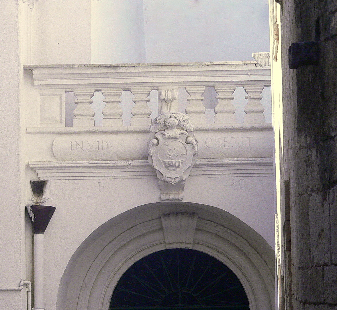 Palazzo Lupoli è un palazzo gentilizio ubicato nel centro storico di Ceglie Messapica. Nella foto, il portale con lo stemma e l'epigrafe "invidus crexit 1680"